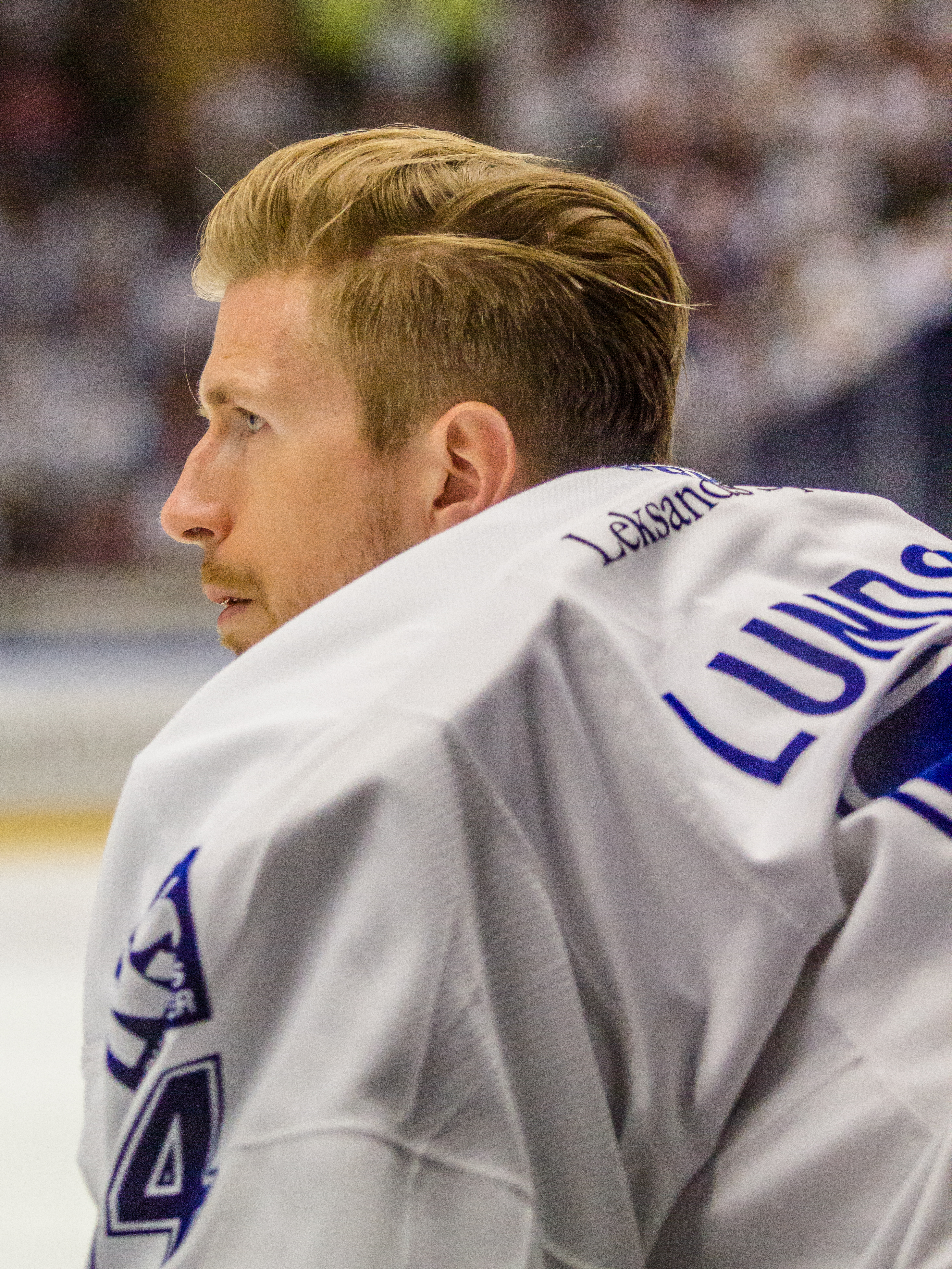 Joakim Lundström i Leksands IF.